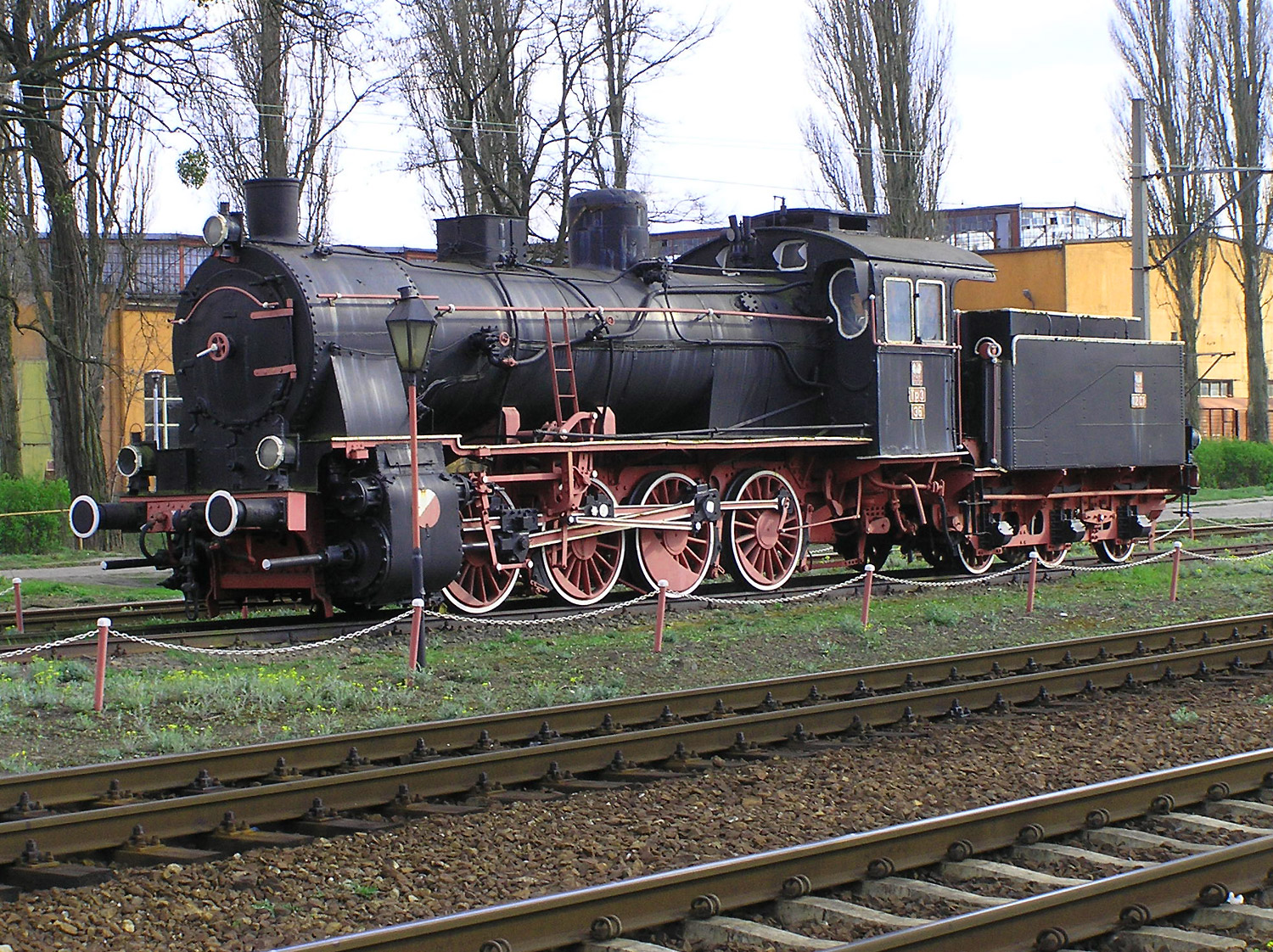 Tp3 class steam locomotive with 12C1 class tender in Zbąszynek, Lubuskie, Poland Parowóz Tp3 z tendrem 12C1 na stacji Zbąszynek (woj. lubuskie)